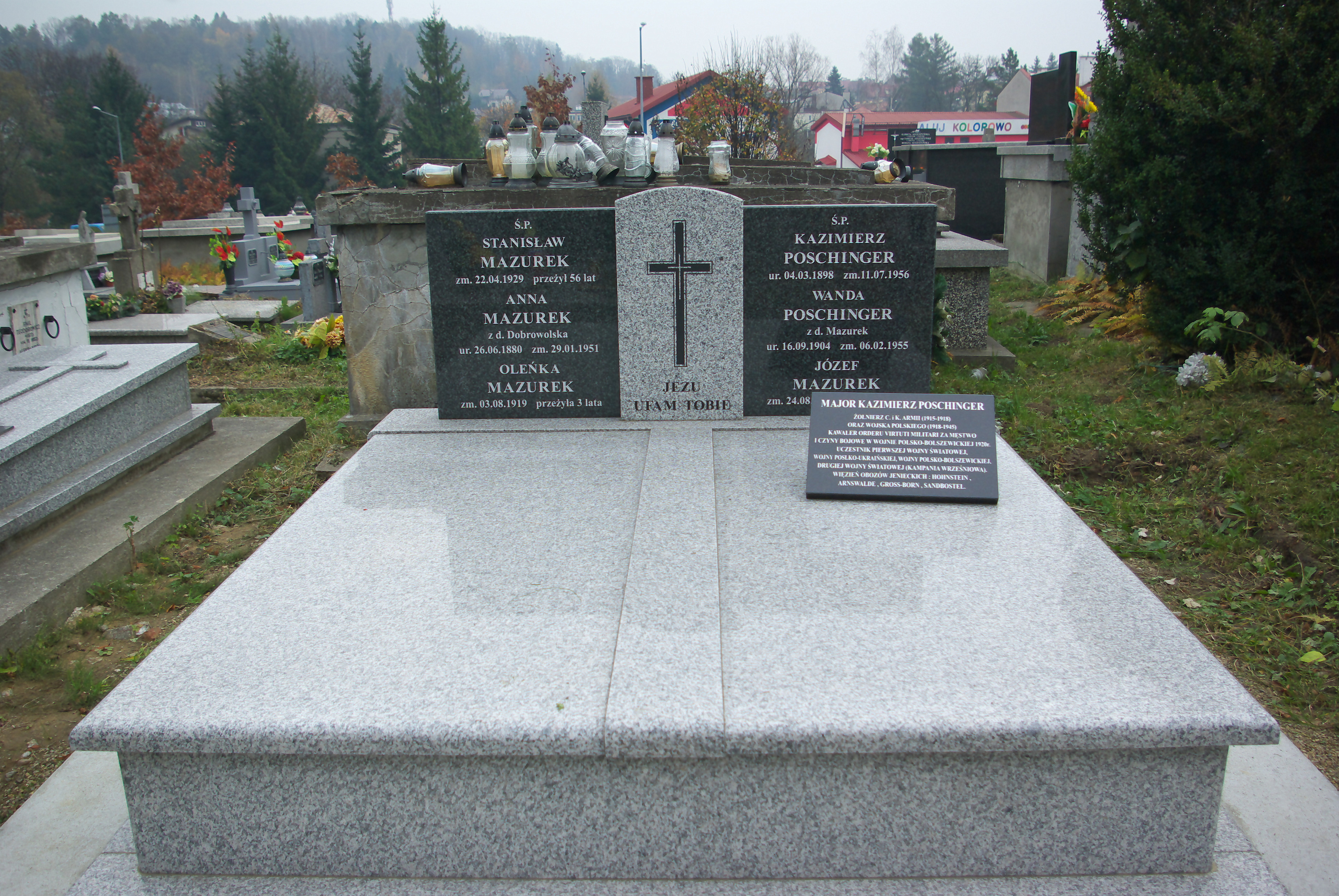 Nagrobek rodzin Mazurek i Poschinger na Cmentarzu Centralnym w Sanoku.